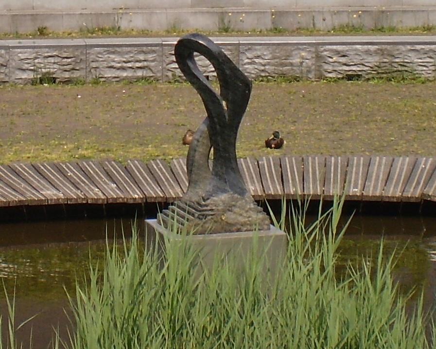 De Terrassen in de wijk Corlaer